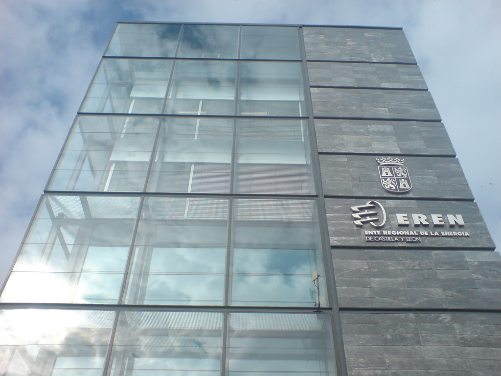 Sede del EREN